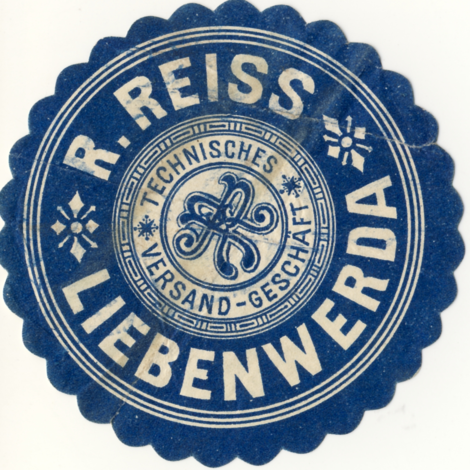 Siegelmarke der Firma Robert Reiss in Liebenwerda